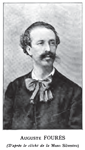 August Forés